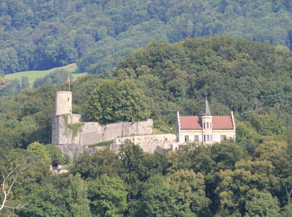 Schloss Bipp